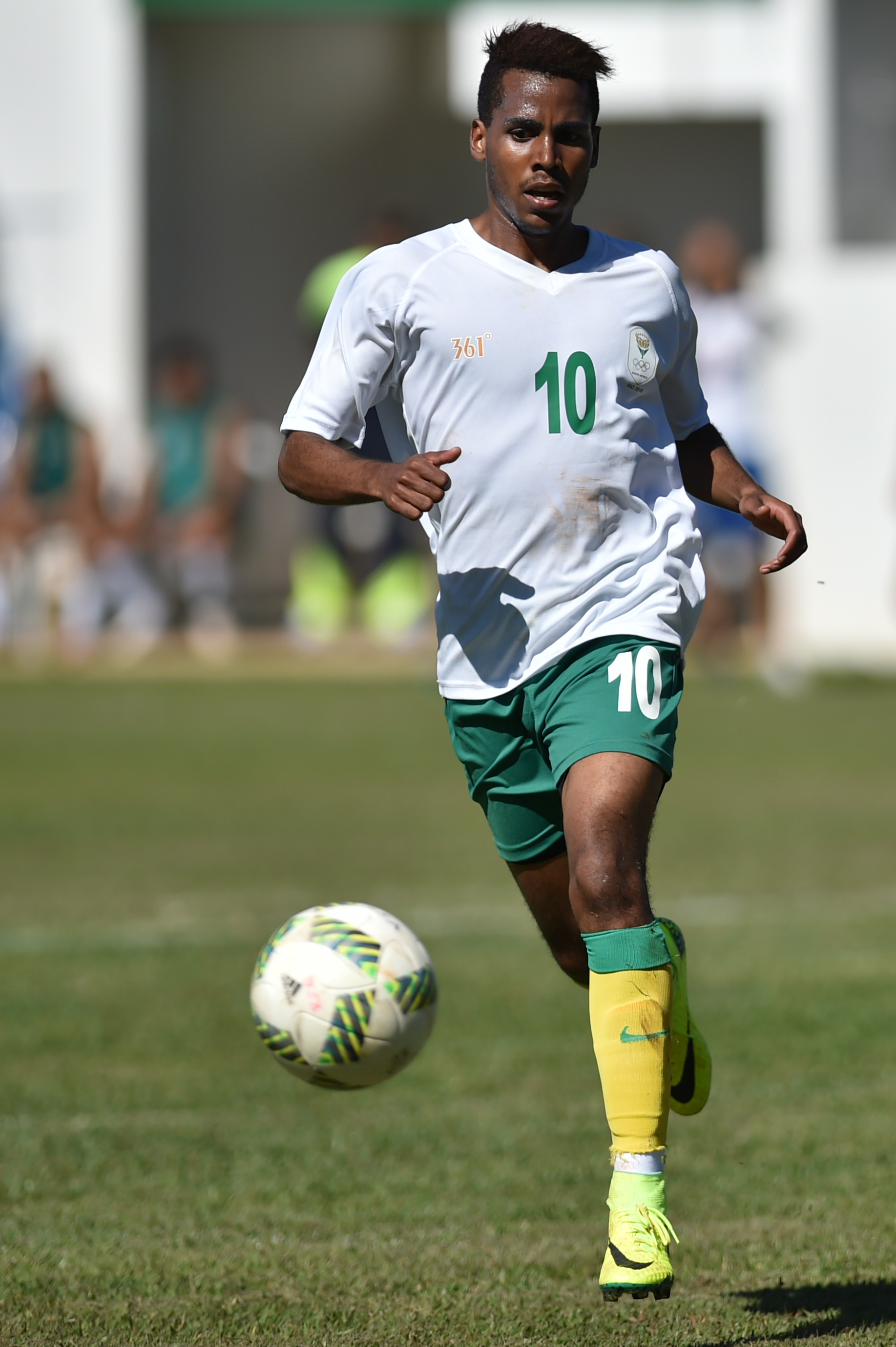 Minas Tênis Clube, Setor de Clubes Norte, Brasília, DF, Brasil, 29/7/2016 Foto: Andre Borges/Agência Brasília. A seleção olímpica da África do Sul enfrentou o time de futebol amador da Polícia Militar do Distrito Federal, na manhã desta sexta-feira (29), no Minas Tênis Clube, no Setor de Clubes Norte. Foi um dos últimos treinos da equipe antes da estreia nos Jogos Olímpicos, na quinta-feira (4), contra o Brasil, no Estádio Nacional de Brasília Mané Garrincha. A partida terminou com a vitória de 4 a 0 a favor dos africanos, mas serviu para a corporação brasilense mostrar hospitalidade. O atacante Tyroane Sandows.